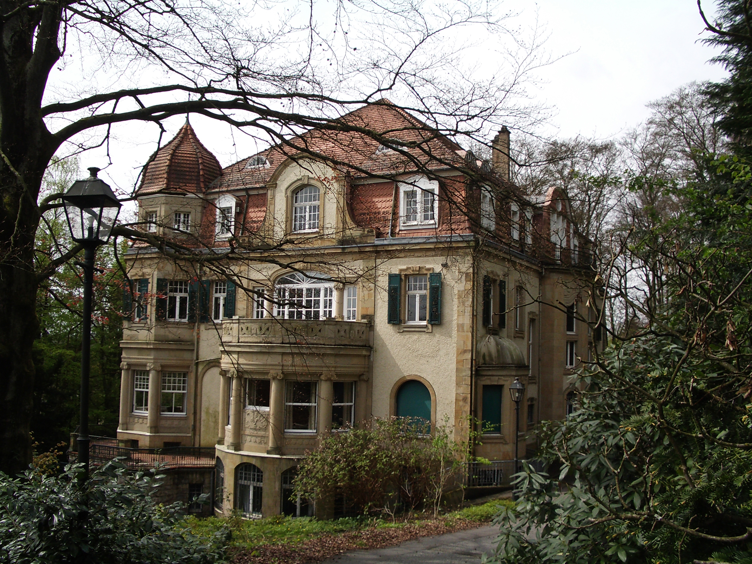 Haus Kerberg in Gummersbach Das Foto entstand bereits am 28.4.2005; zu dieser Zeit war der Zufahrtsweg für private Fußgänger noch geöffnet.